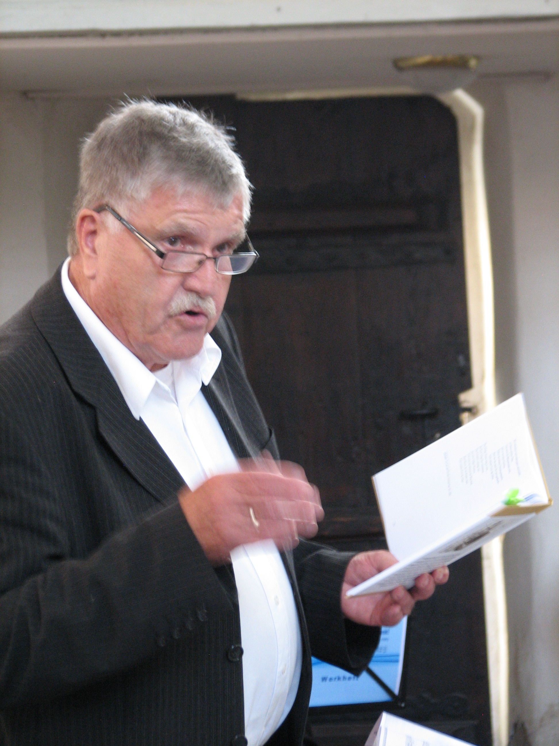 Friedemann Steiger (Foto vom September 2017)